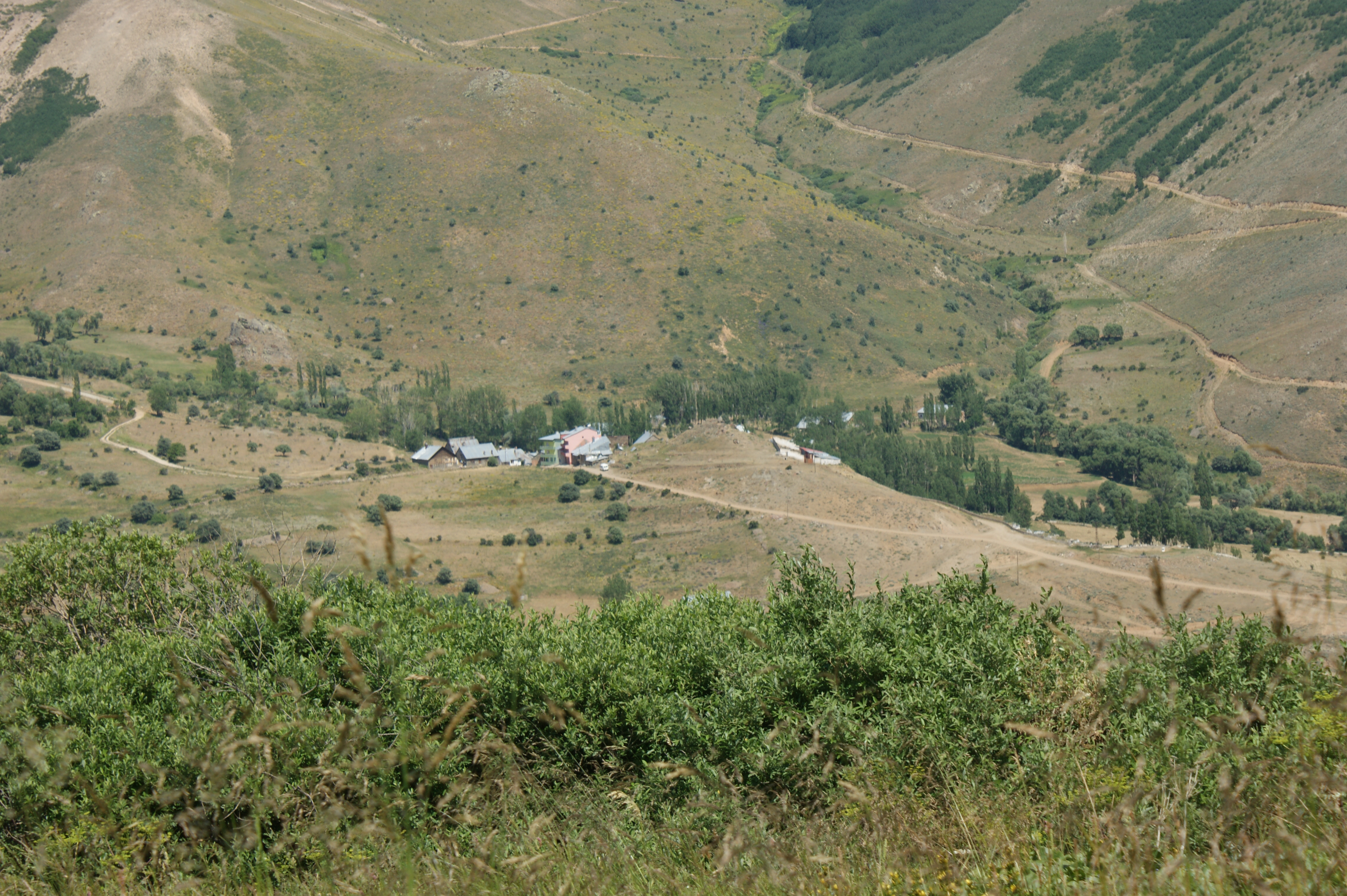 Saracobası'ndan Sorkunlu